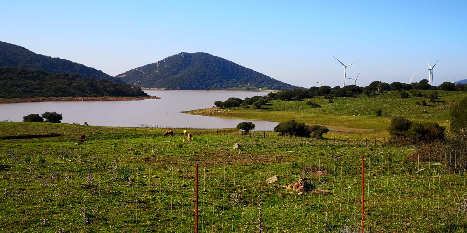 Vista del cerro Almodóvar o Torrejosa en el que posiblemente murieron los mártires Servando y Germán en la provincia de Cádiz